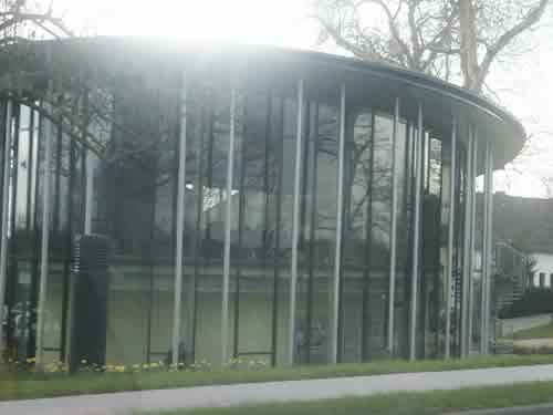 Kleve, Euregio Maas-Waal, Conference Room